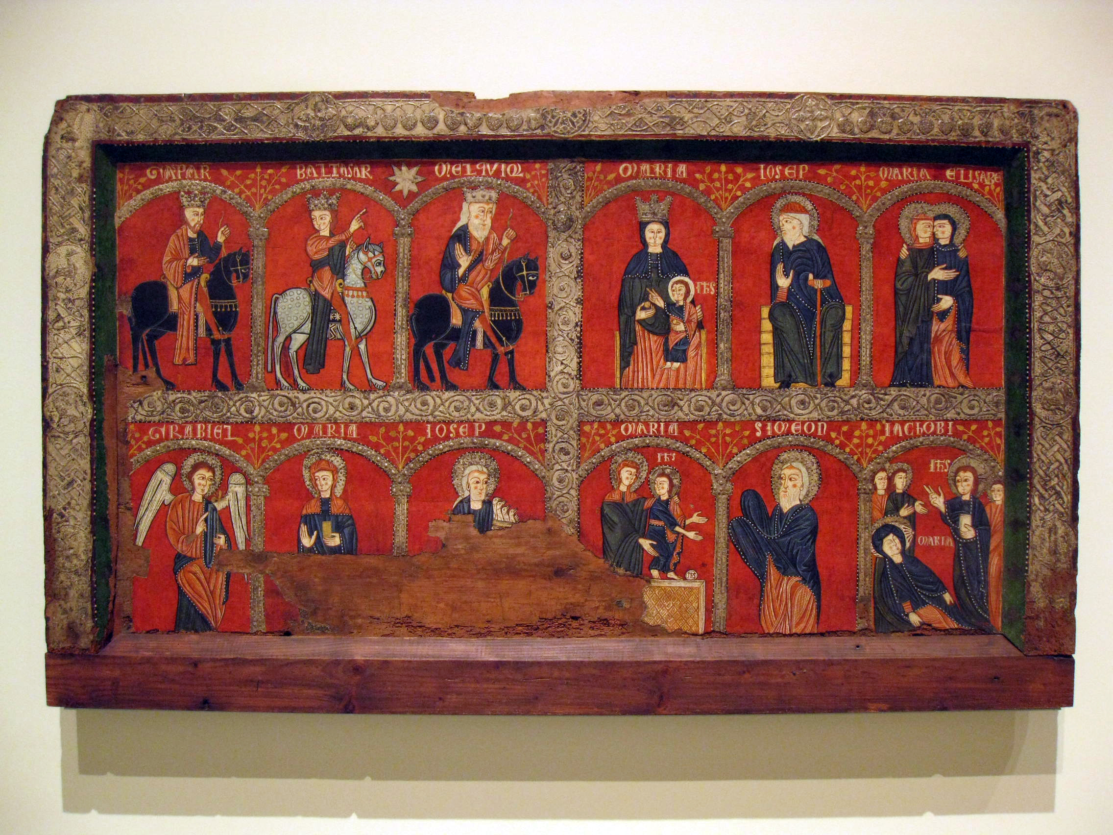 Palau Nacional (Barcelona)